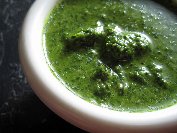 Italian salsa verde recipe